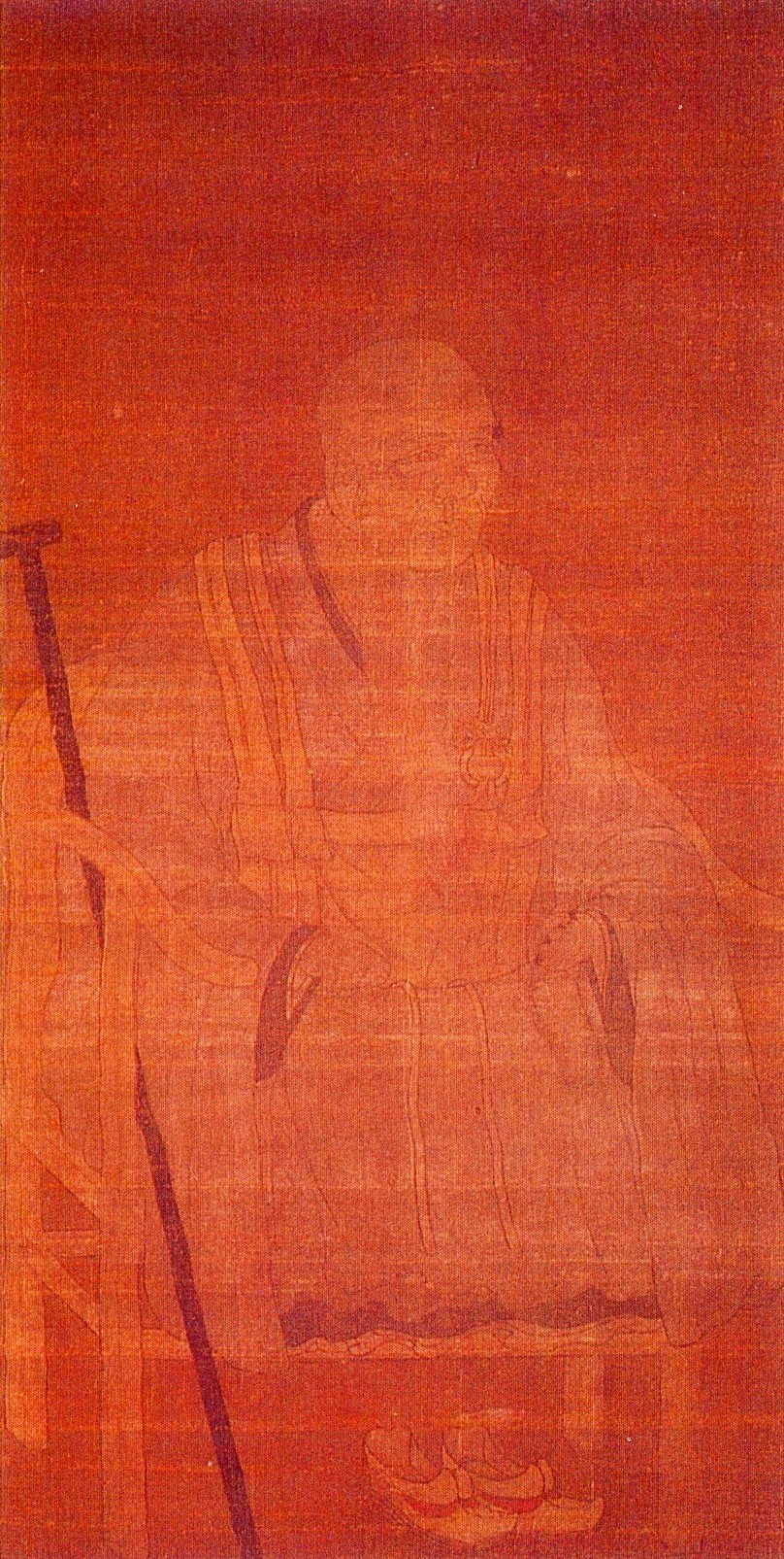 岩槻太田氏2代当主・太田資頼の肖像画。